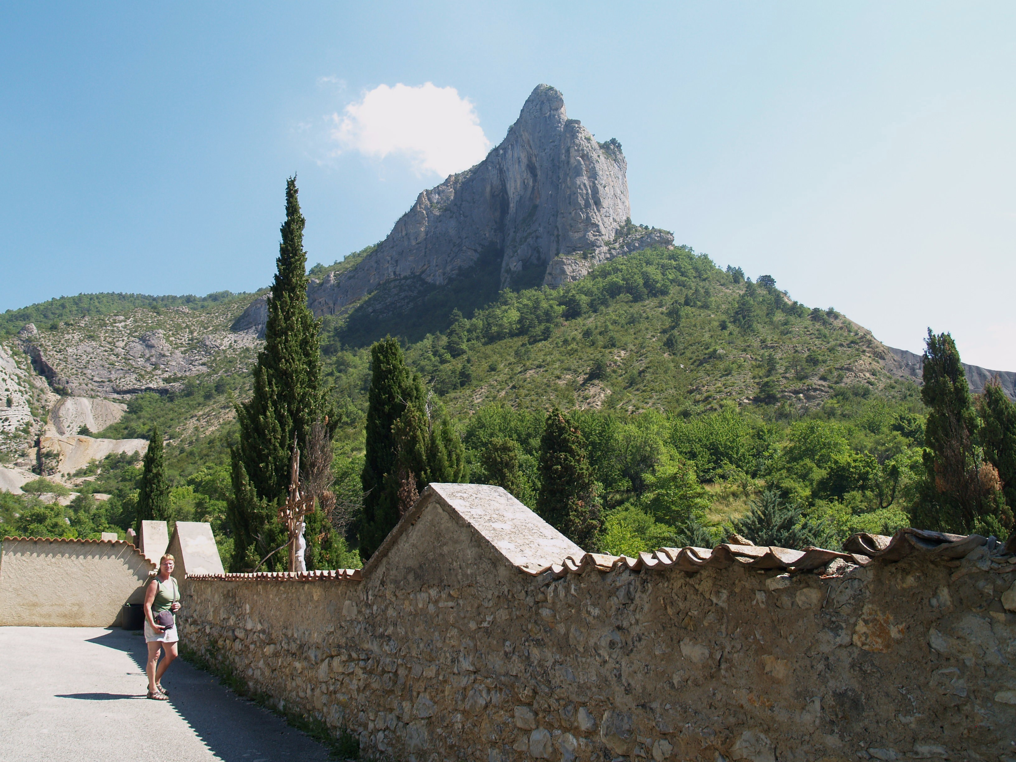 Orpierre bij het kerkhof